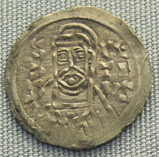 Stato della chiesa, denaro di anastasio III, 911-913